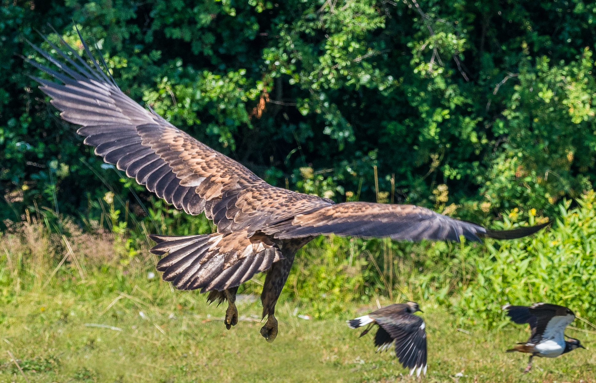 Haliaetus albicilla